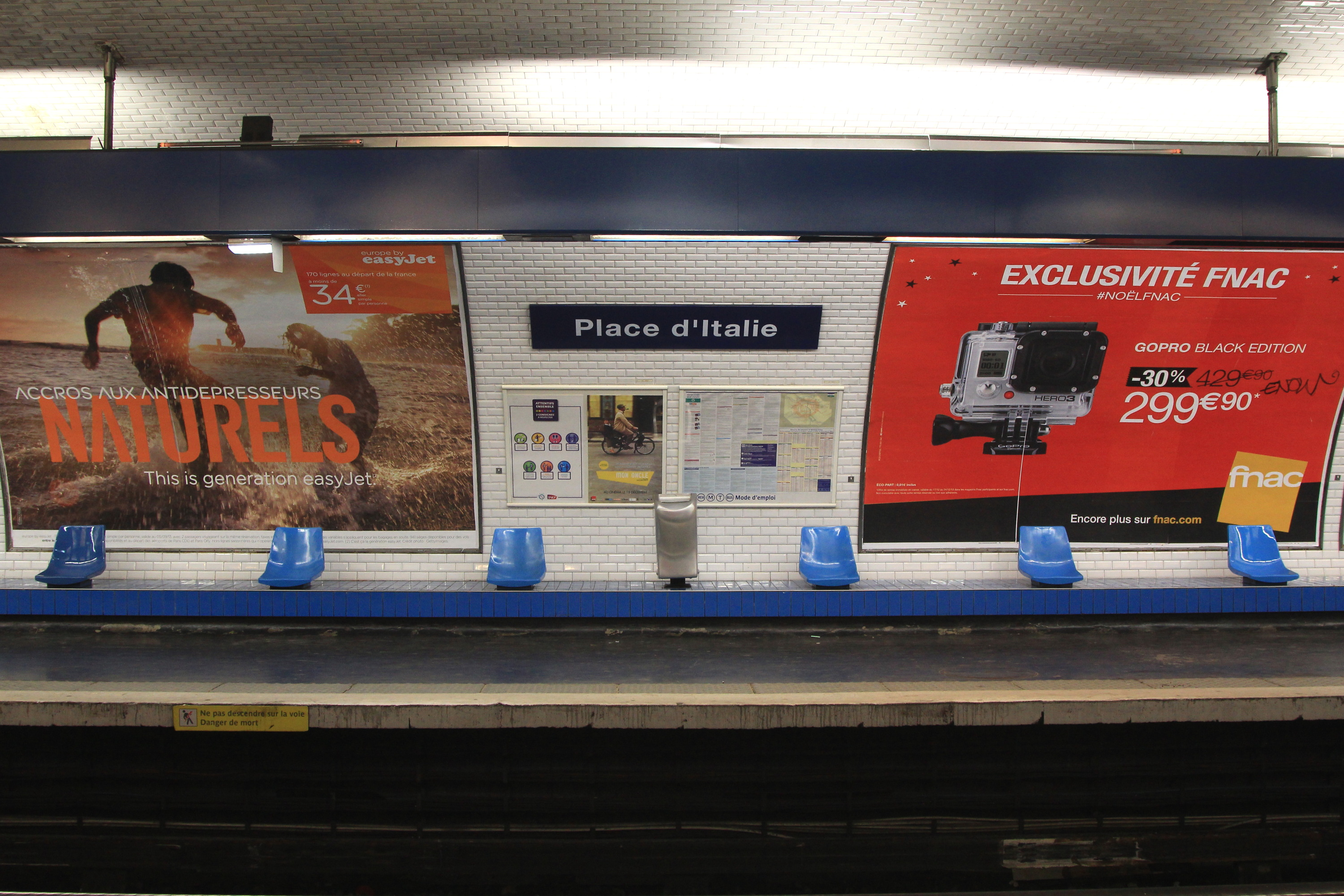 Vue latérale du quai direction Nation de la station du métro parisien Place d'Italie (ligne 6). On y voit des sièges "Motte" de Joseph-André Motte (Français, 1925-2013), créés par la RATP en 1973.